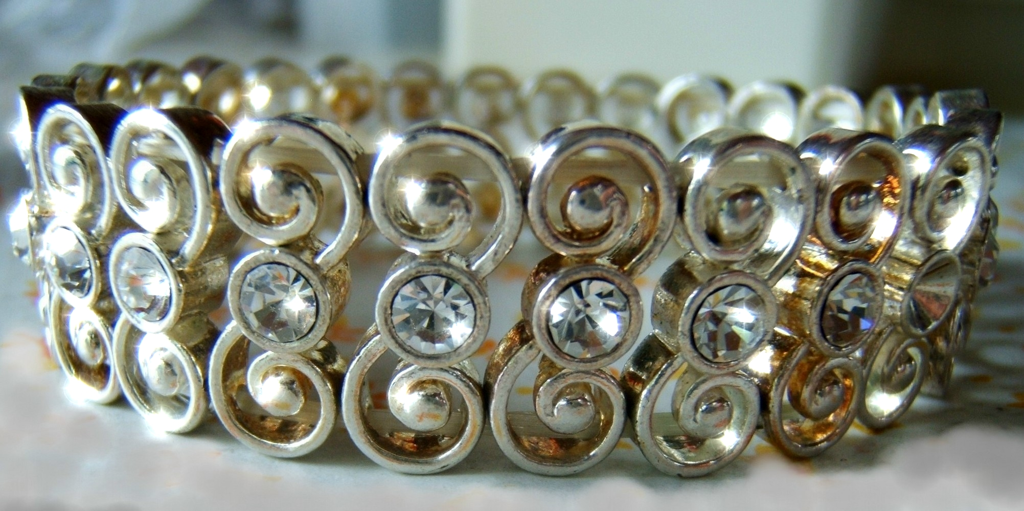 Bling bling armband